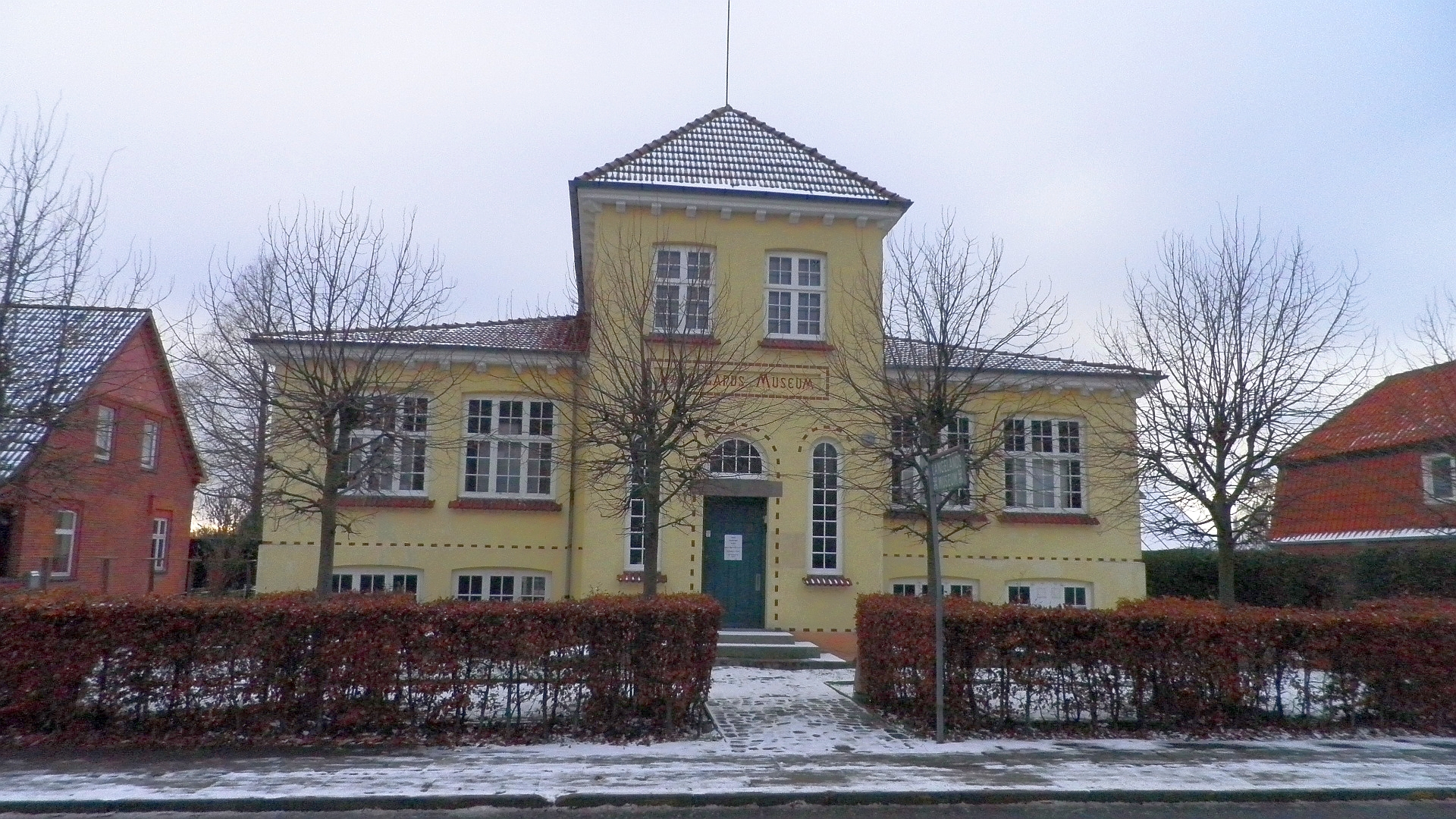 Langelands Museum på Jens Winthersvej i Rudkøbing